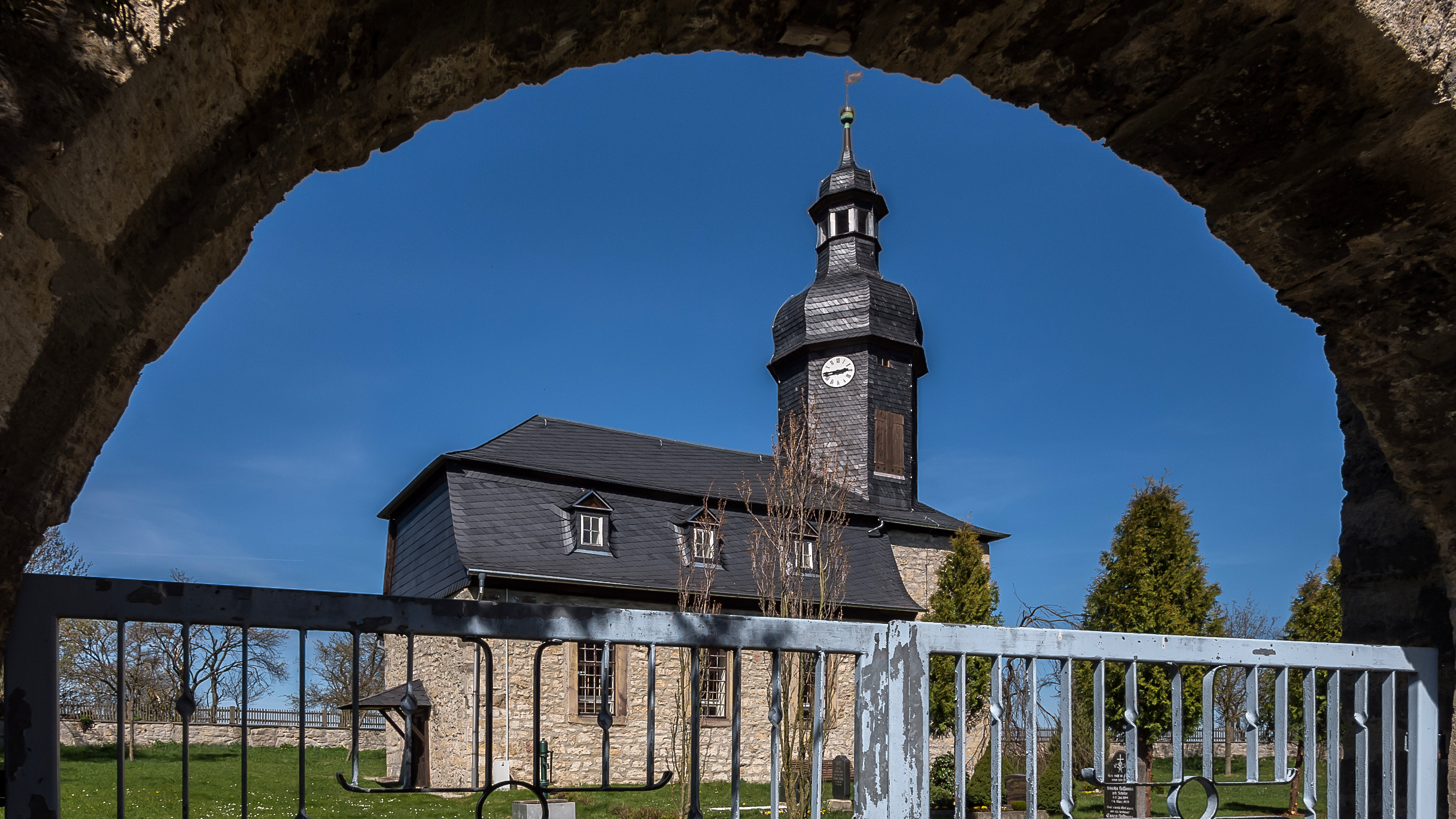 Lotschen Dorfkirche mit Eingangsbogen